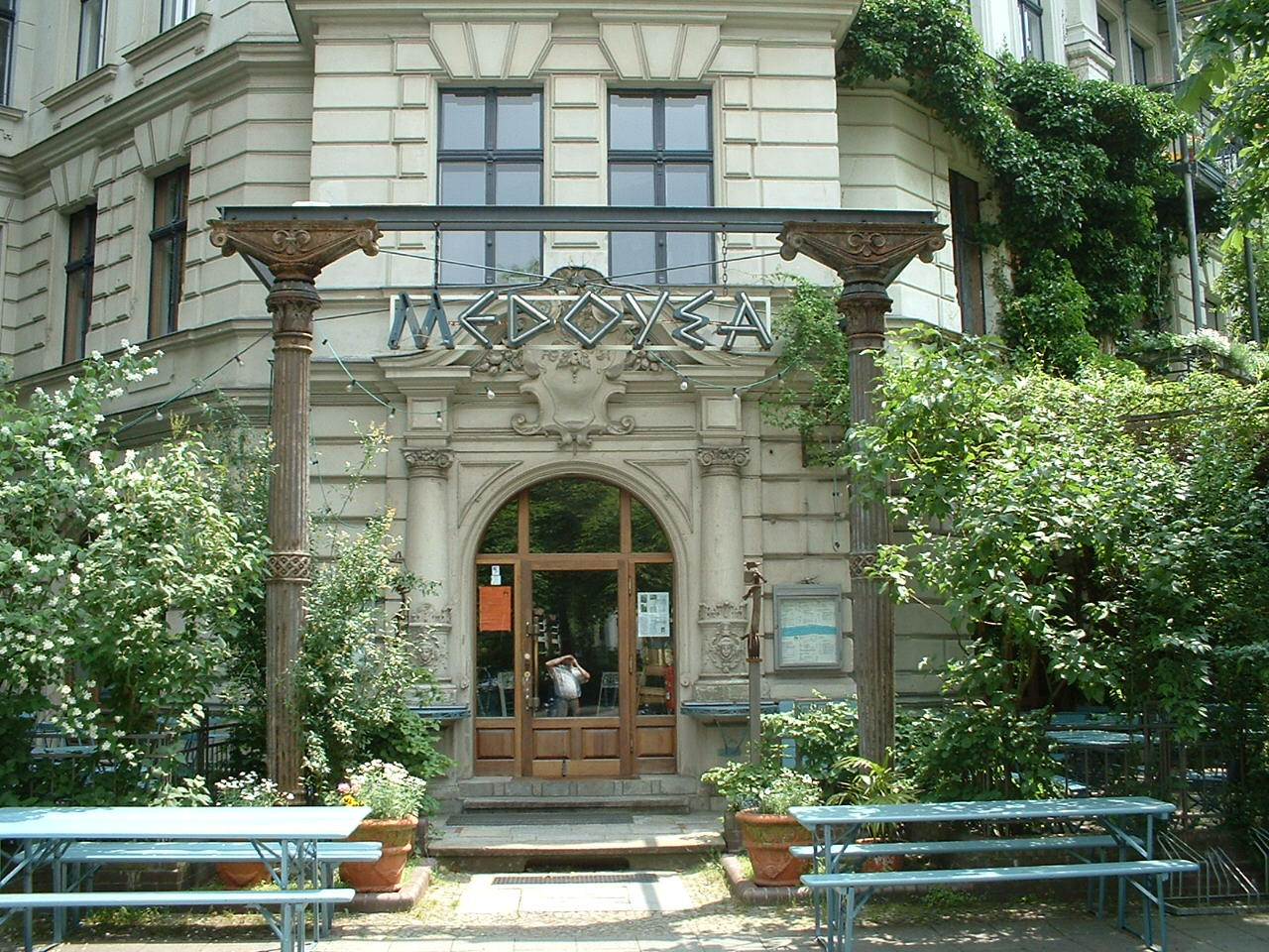 Hartungsche Säule (Fremdnutzung)